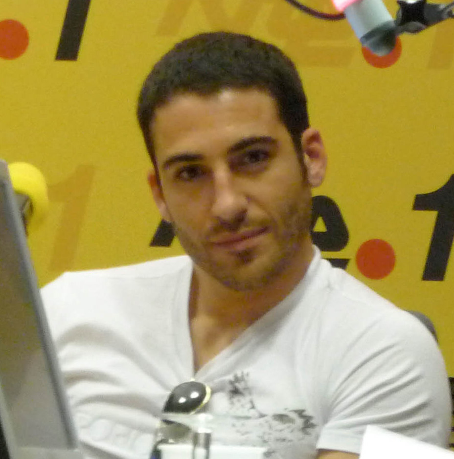 Miguel Ángel Silvestre en RNE para presentar la película la película 3:19